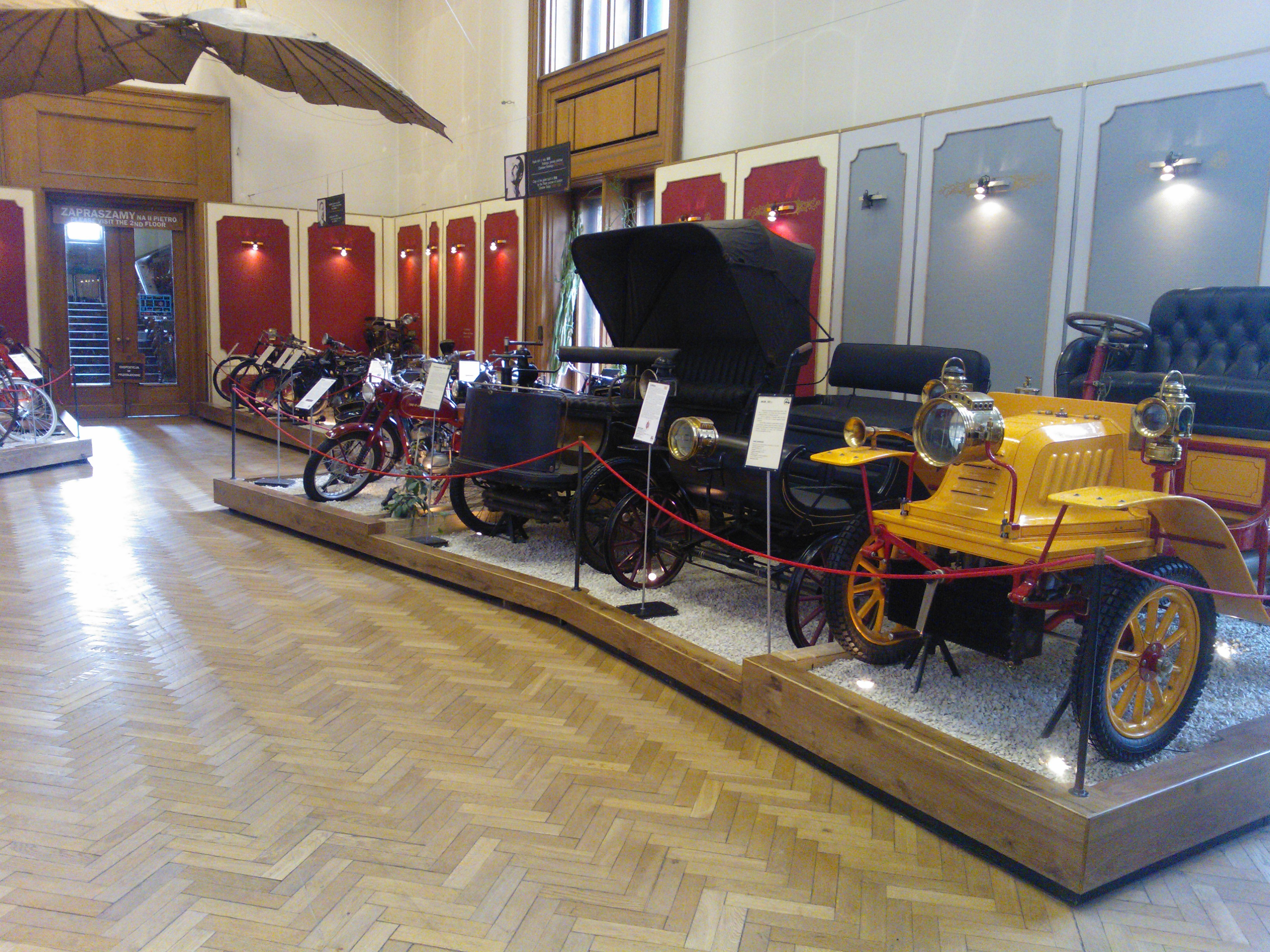 Sala Transportu w Muzeum Techniki i Przemysłu NOT